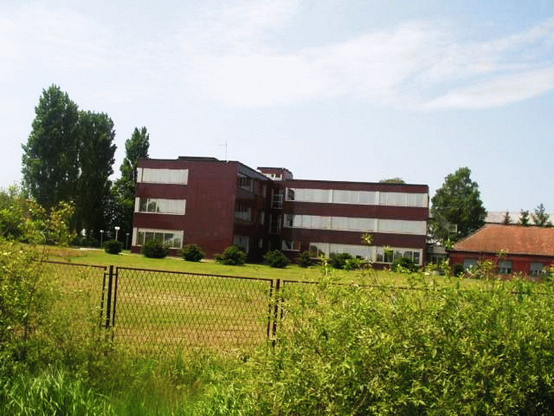 Djurište - PIK Main Building